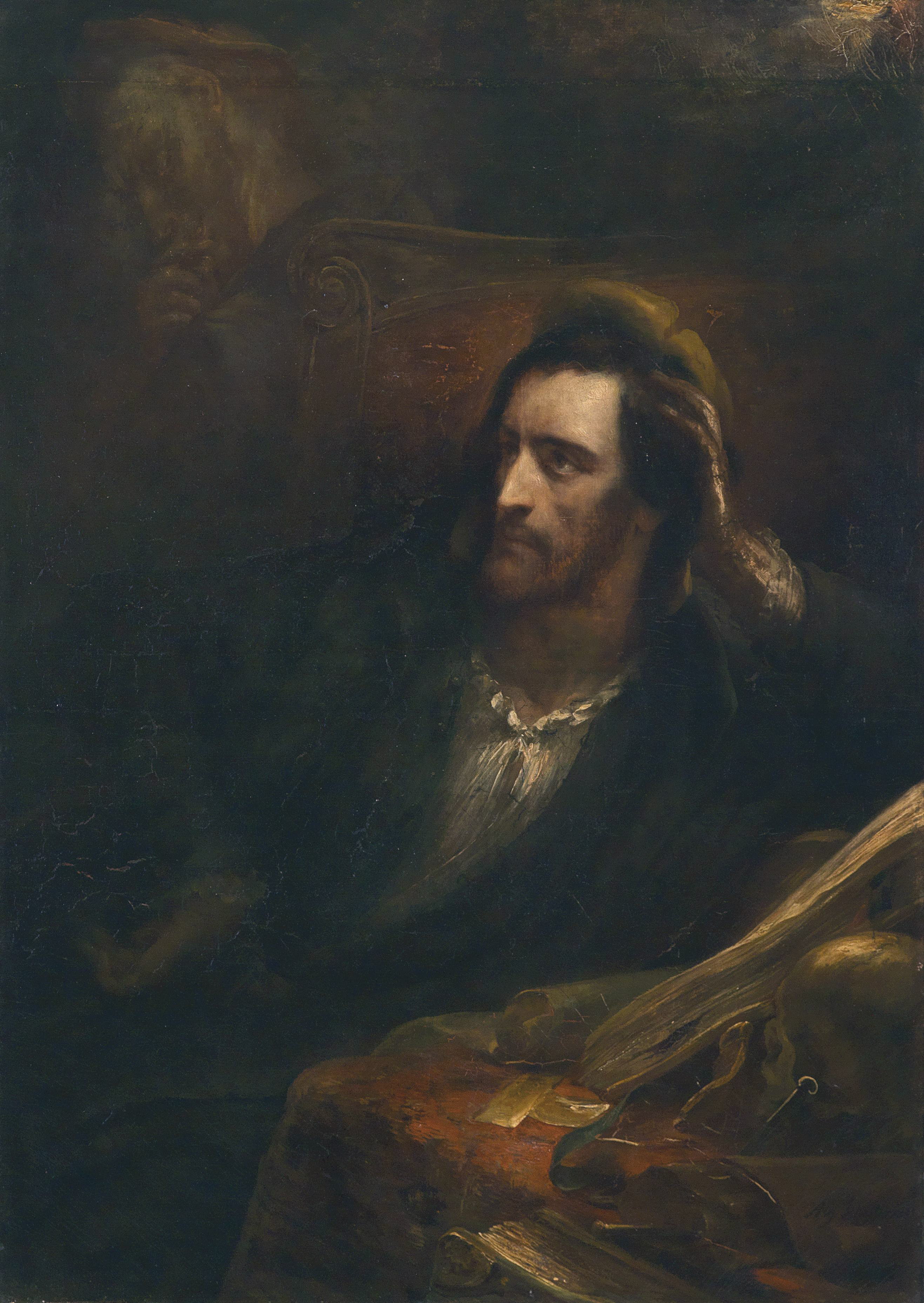 Faust in seiner Studierstube, rechts unten signiert und datiert "Ary Scheffer 1831", Öl auf Leinwand, 125 x 88 cm, oben möglicherweise vom Künstler selbst 9 cm angestückt